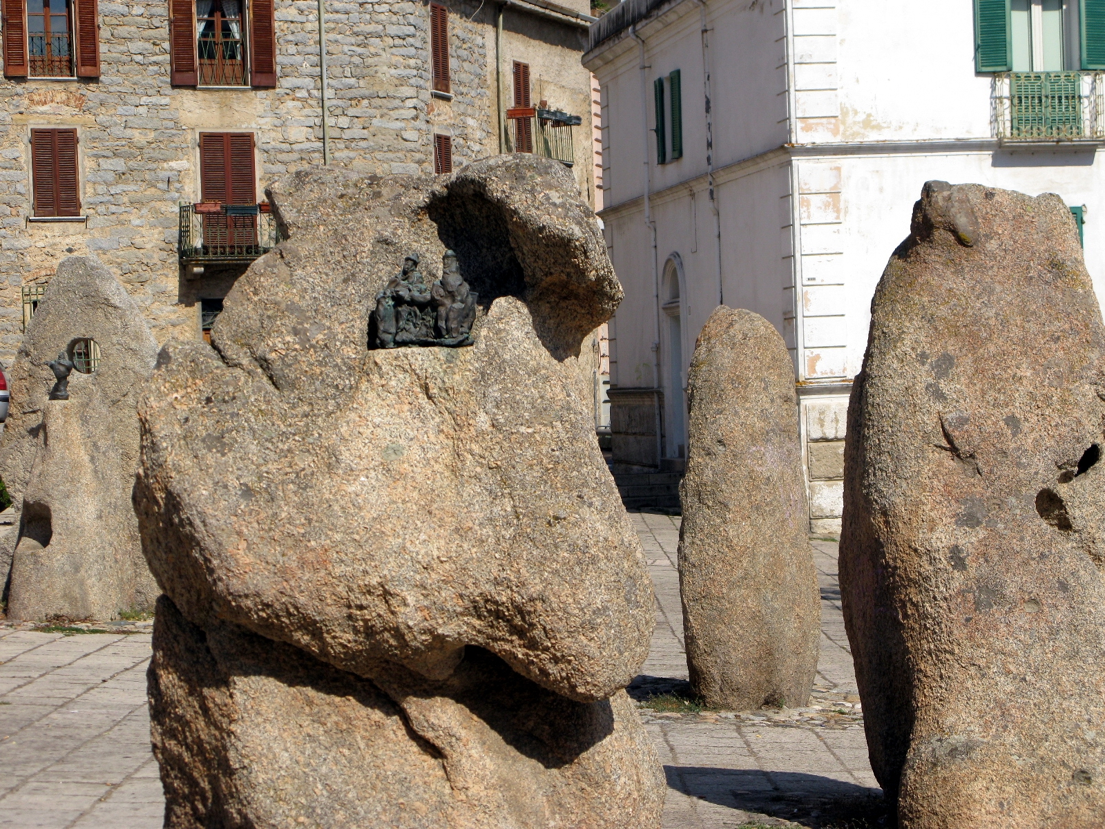 Piazza S. Satta a Nuoro - opere di Costantino Nivola